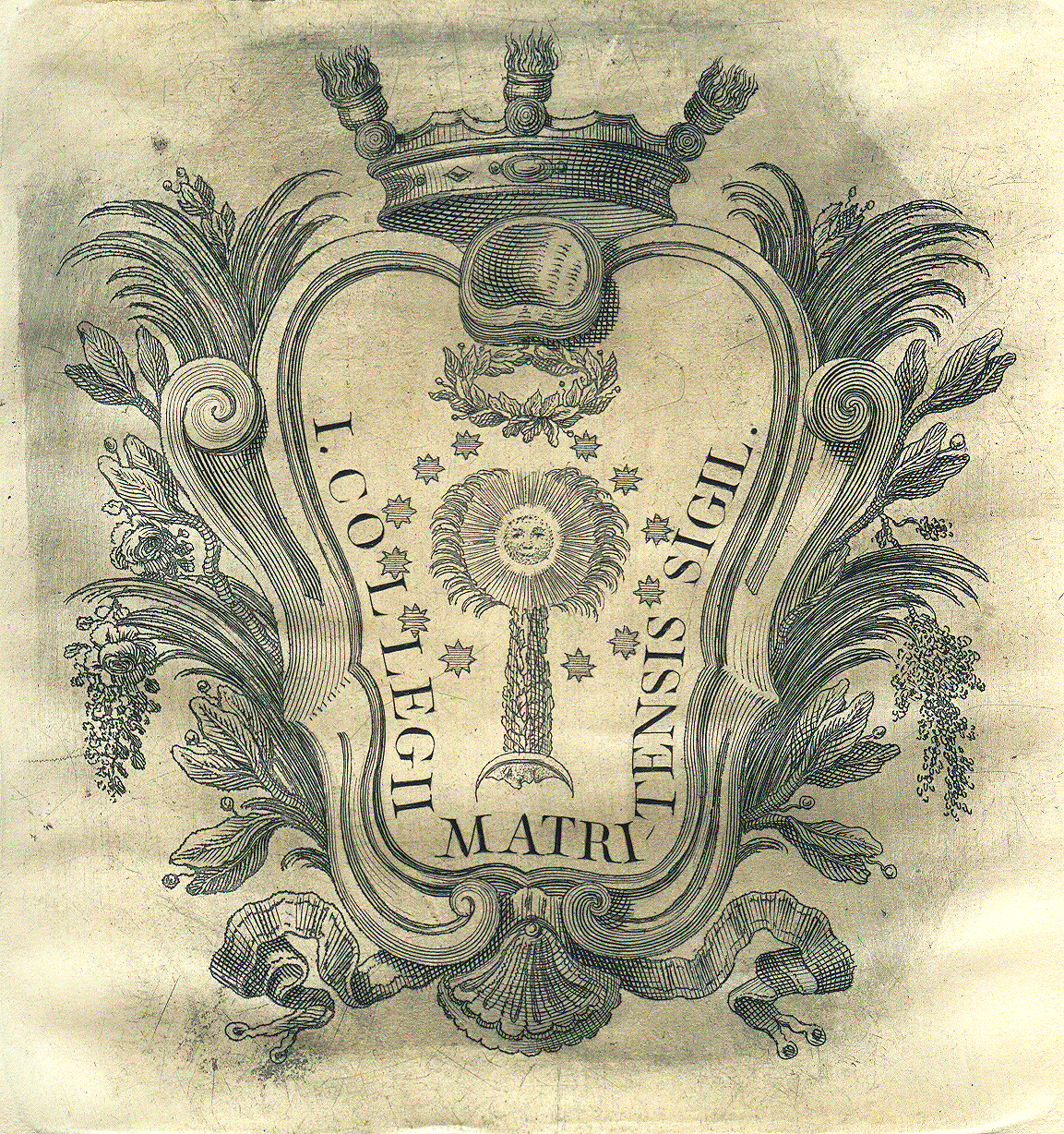 Escudo histórico del Ilustre Colegio de Abogados de Madrid, del siglo XVIII.